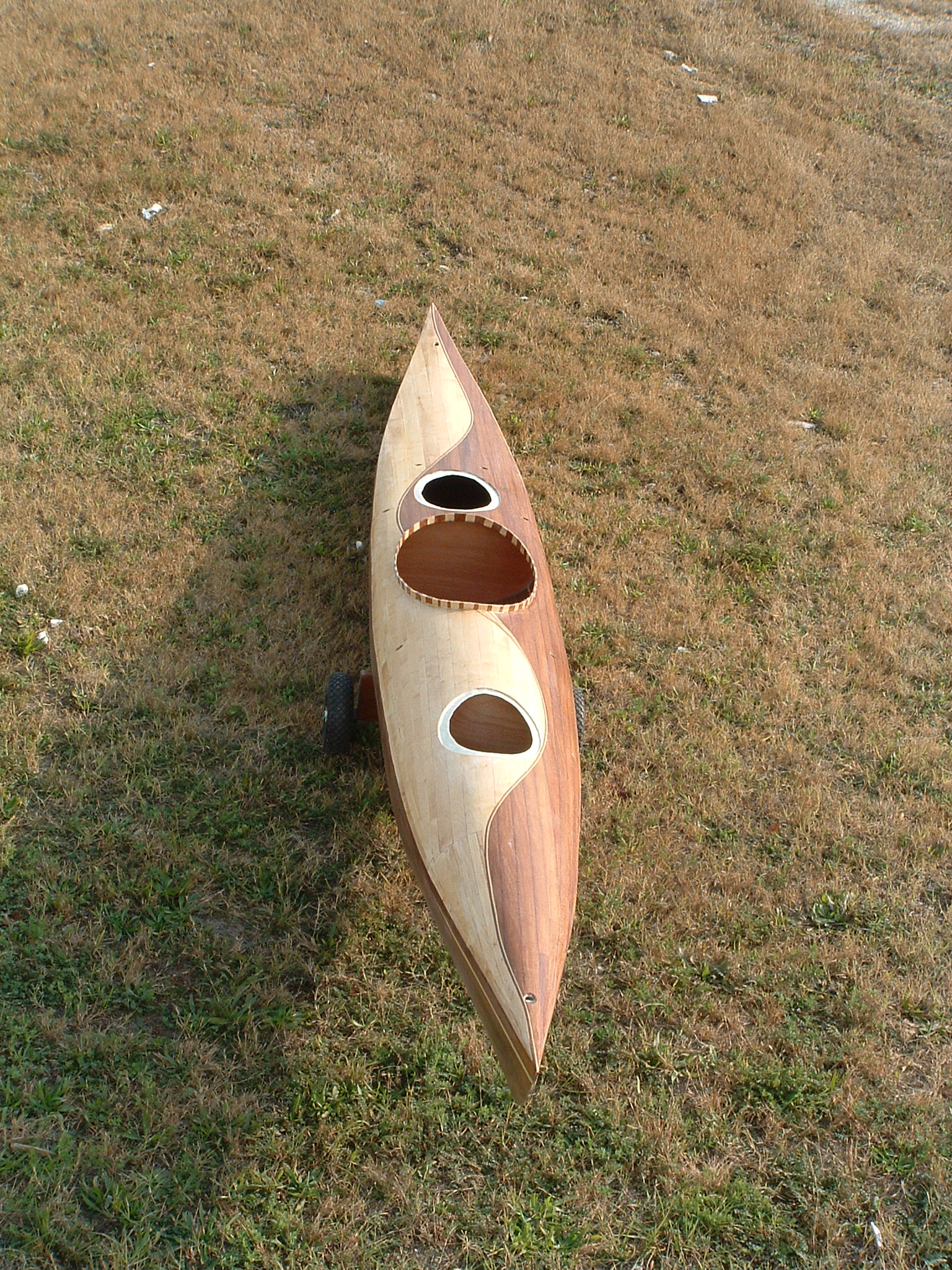 autore=Lucidi Fabio fonte=propria descrizione=kayak autocostruito in legno licenza uso=free